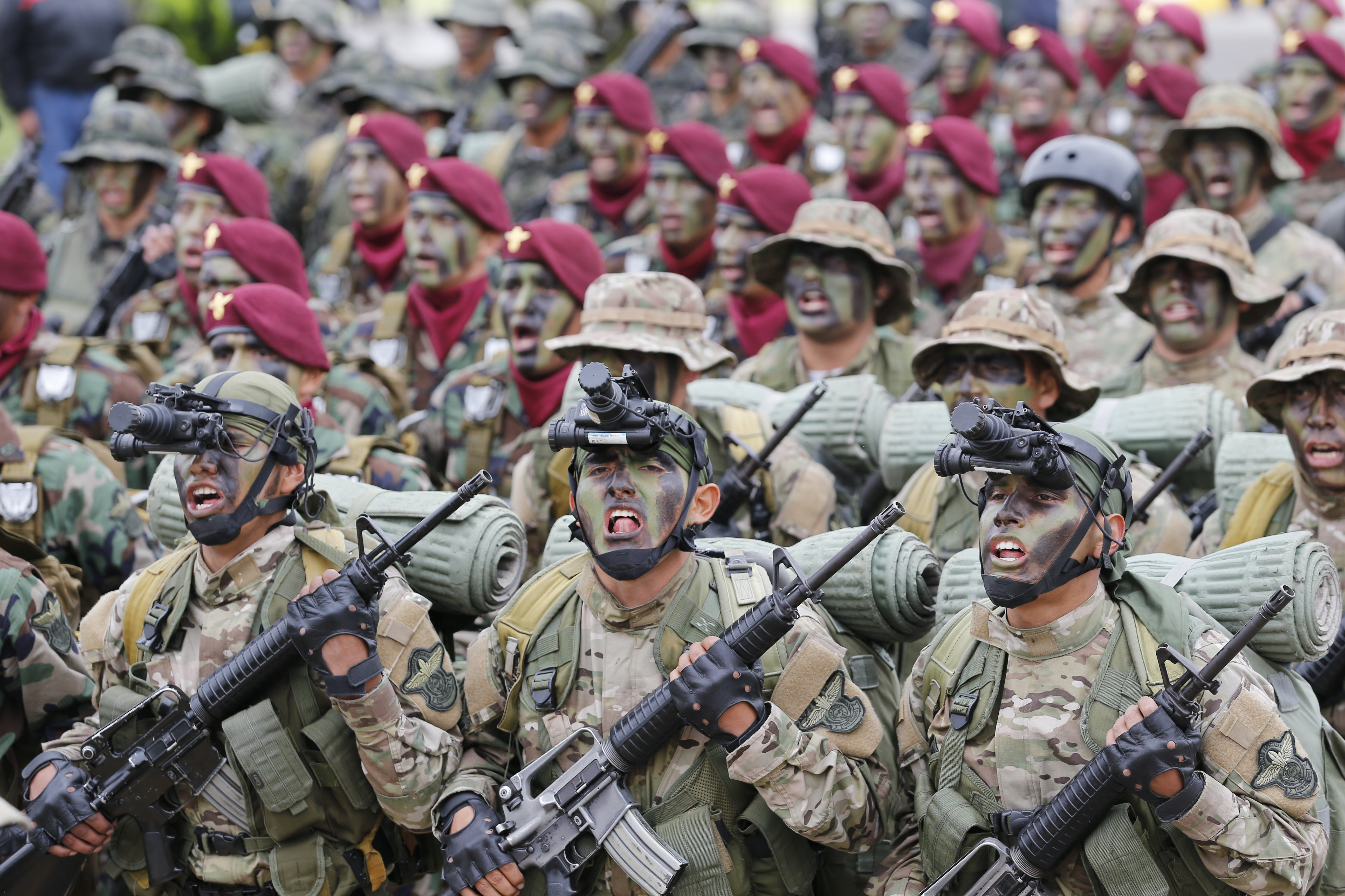 El Presidente Constitucional de la República Ollanta Humala Tasso, presidió la ceremonia por el "Día de la Policía Nacional del Perú" -cuyo día central es este domingo 30 de agosto- llevada a cabo en el Patio de Honor de la Escuela de Oficiales PNP en la Campiña - Chorrillos. A este significativo acto asistieron ministros de Estado, entre ellos el ministro de Defensa, Jakke Valakivi Álvarez, congresistas de la República, integrantes del Alto Mando Policial, Comandantes Generales de las FF AA, entre otras autoridades civiles, religiosos, políticos y militares, especialmente invitadas. Las Fuerzas Armadas se hicieron presentes en el desfile mediante batallones de las Escuelas de Oficiales del Ejército, Marina de Guerra y Fuerza Aérea del Perú. Jesús María, 29 de agosto de 2015 Oficina de Prensa MINDEF